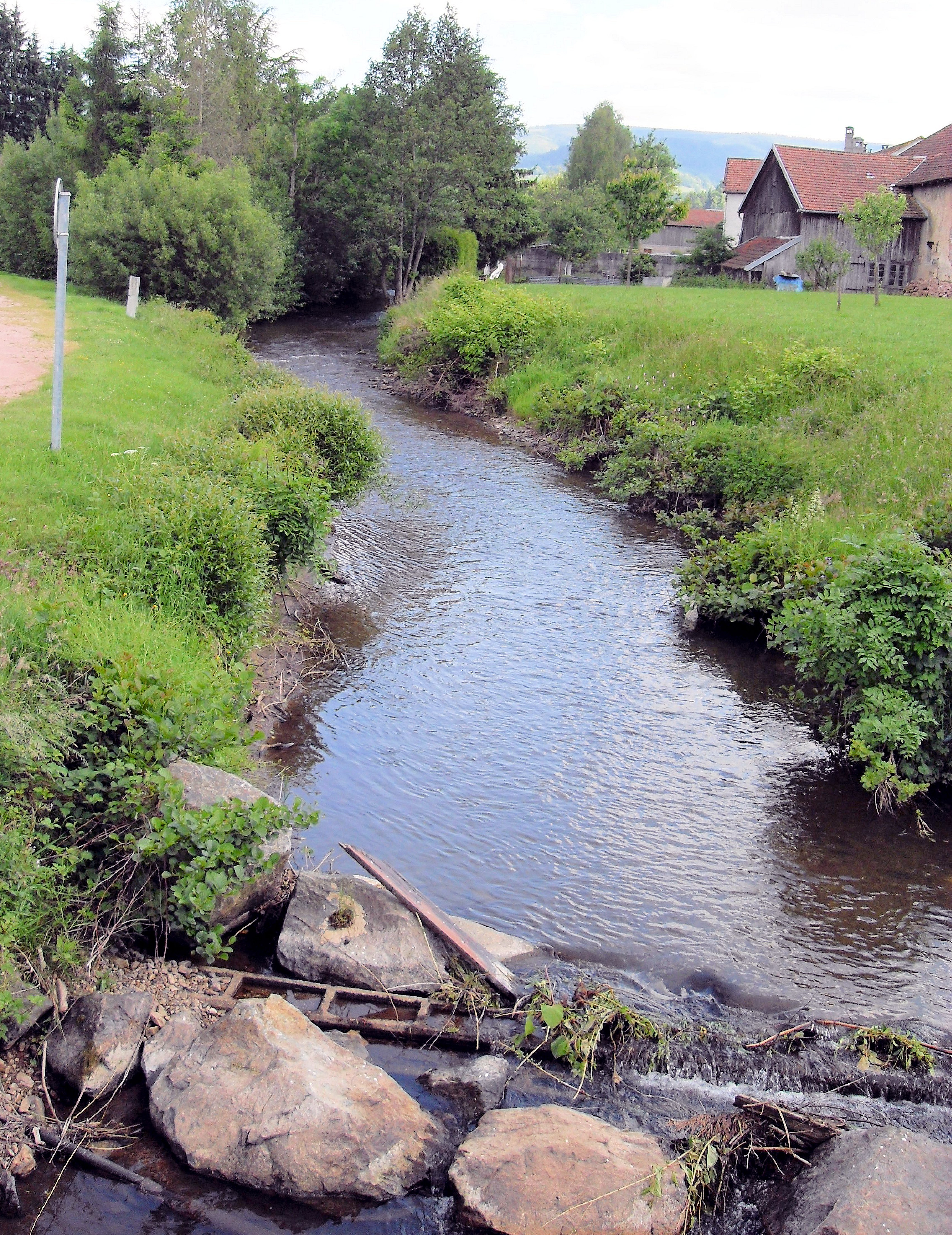 La Morte à Raves